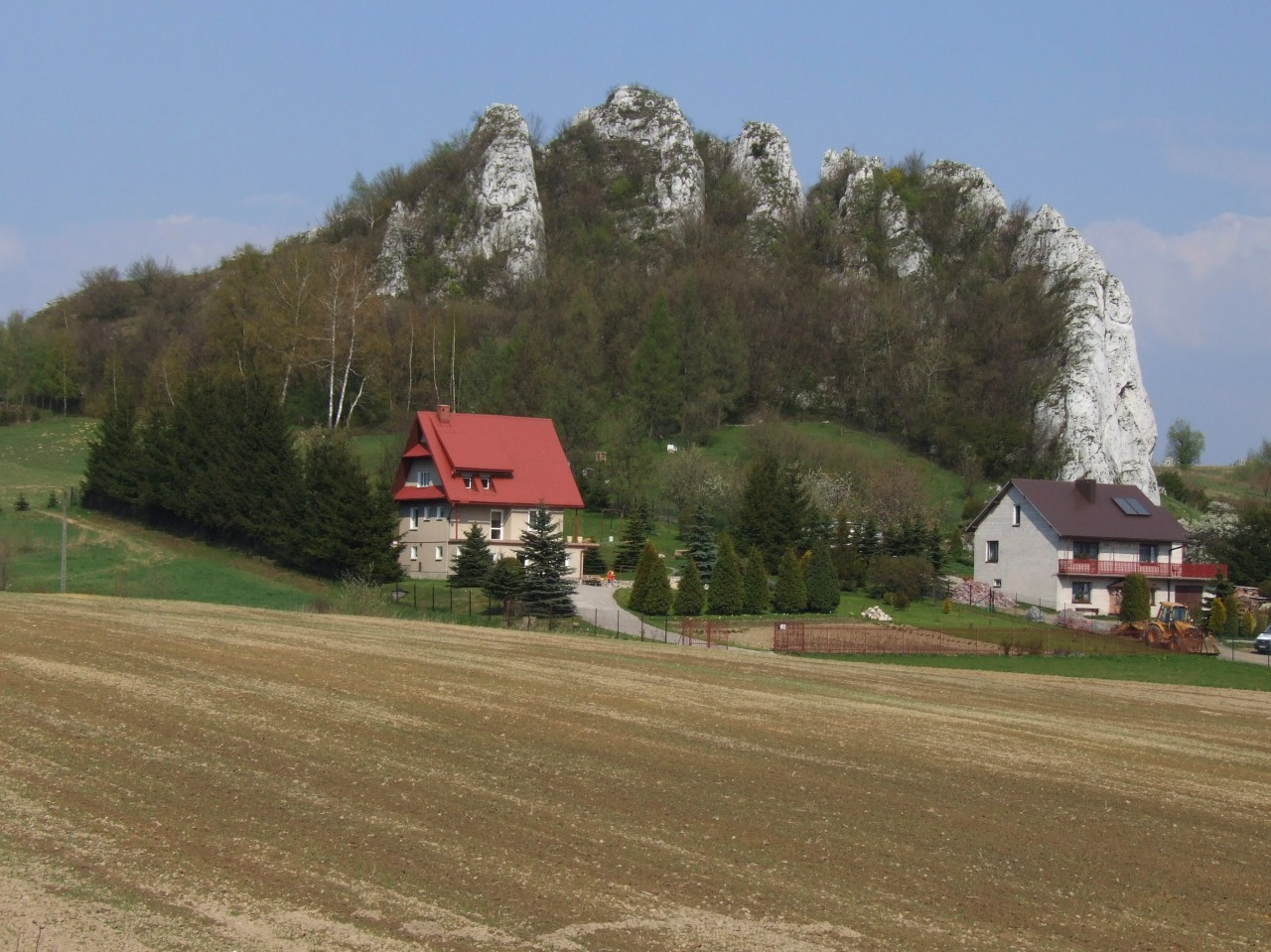 Skała Fiala z grupy Ostańców Jerzmanowickich